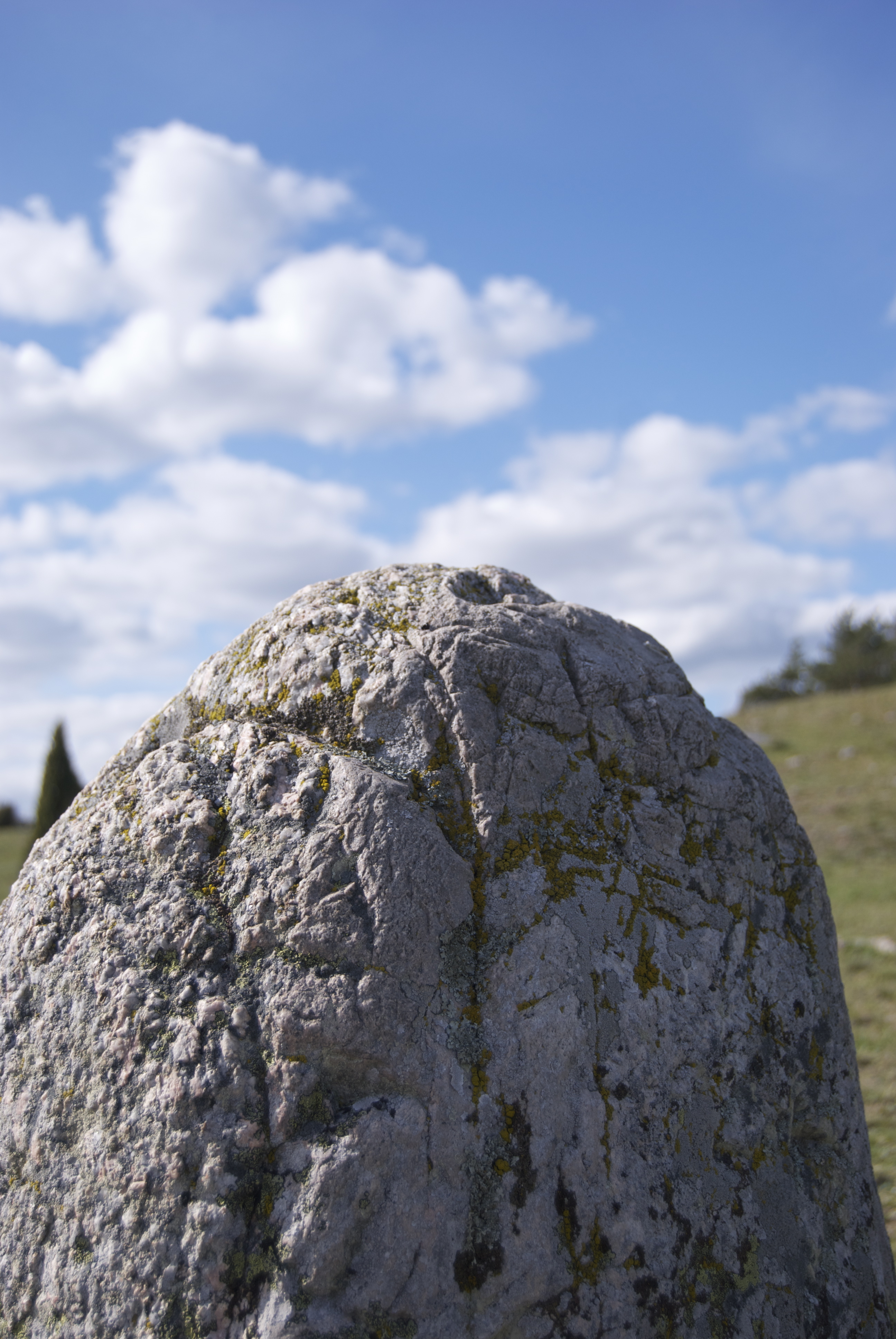 Gravfält (RAÄ-nr Torstuna 101:1) på Vånsjöåsen, Torstuna socken, Enköpings kommun, Uppsala län, Uppland, Sverige.